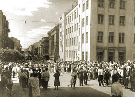 перекресток улиц К.Маркса и Ленина